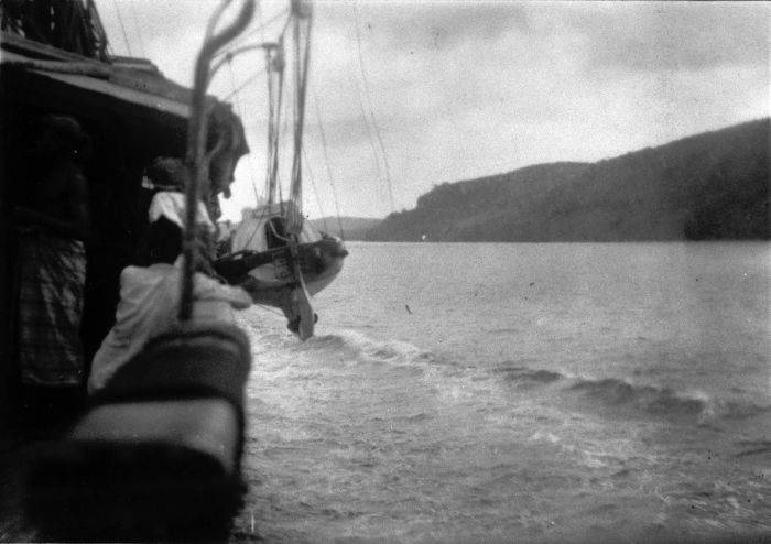 Foto. Varen door straat Boetoeng, ten zuiden van Celebes.